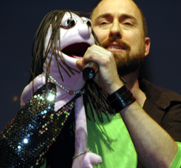 Holger Edmaier bei seinem Kurzauftritt auf der Freiburger Kulturbörse 2009